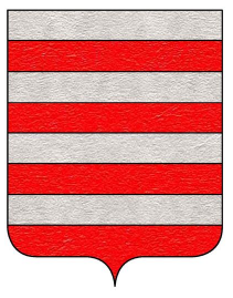 Stemma della famiglia Villaragut